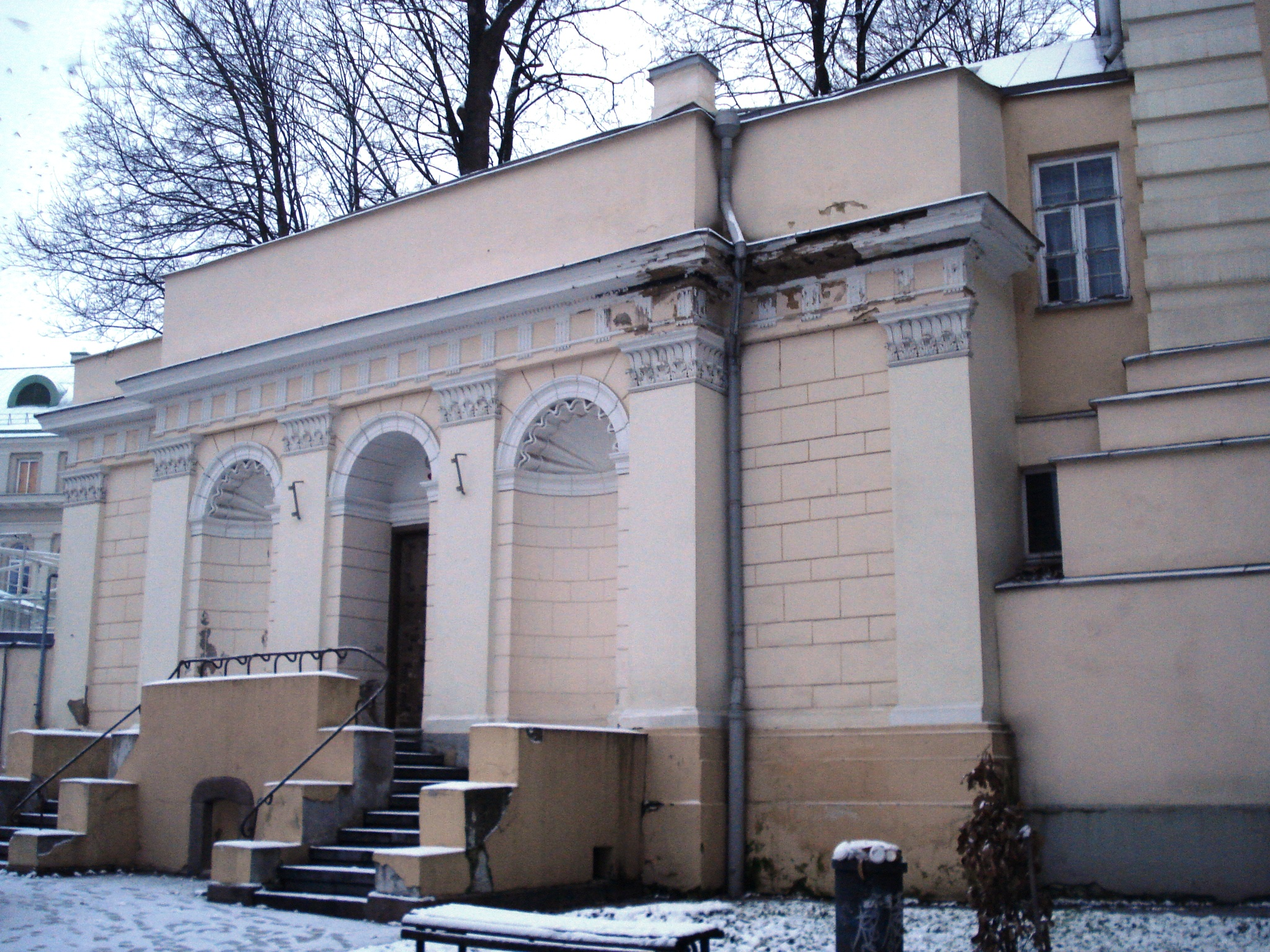 Ворота в стиле ампир (проект архитектора Жозефа Пусье, 1809) монастыря кармелитов. Вильнюс